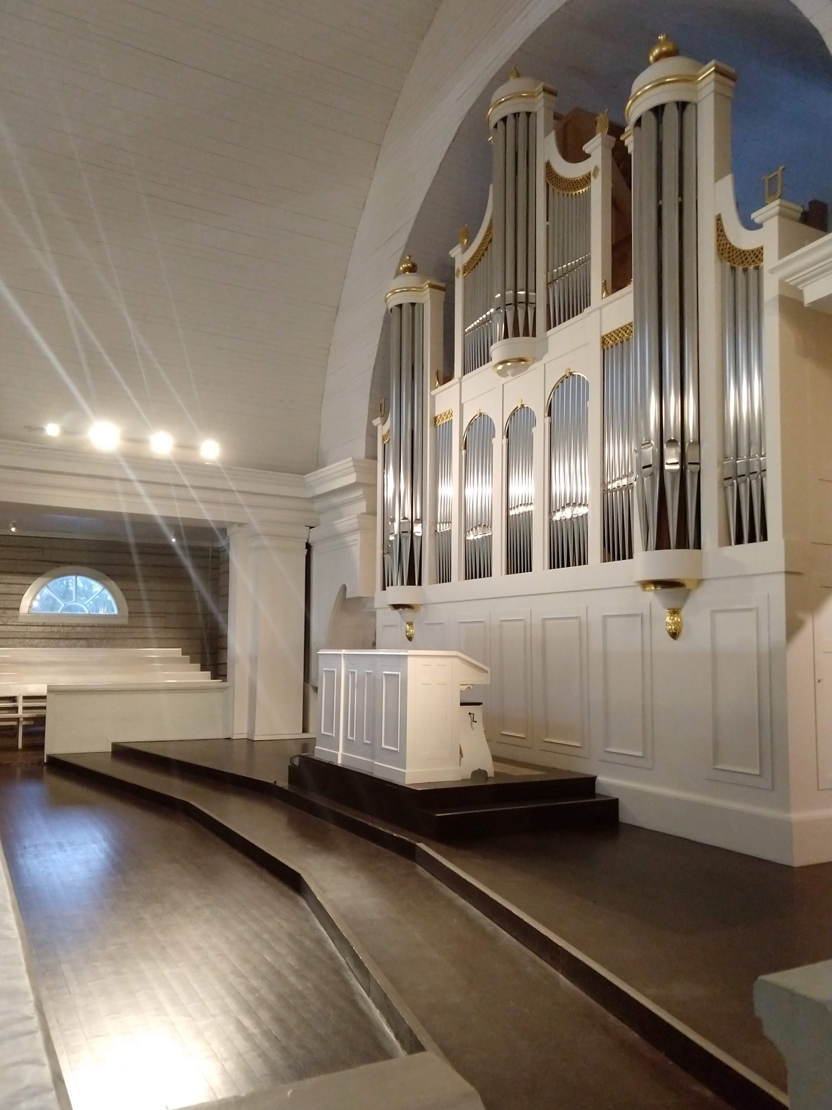 Urkurakentamo Veikko Virtanen 2008.